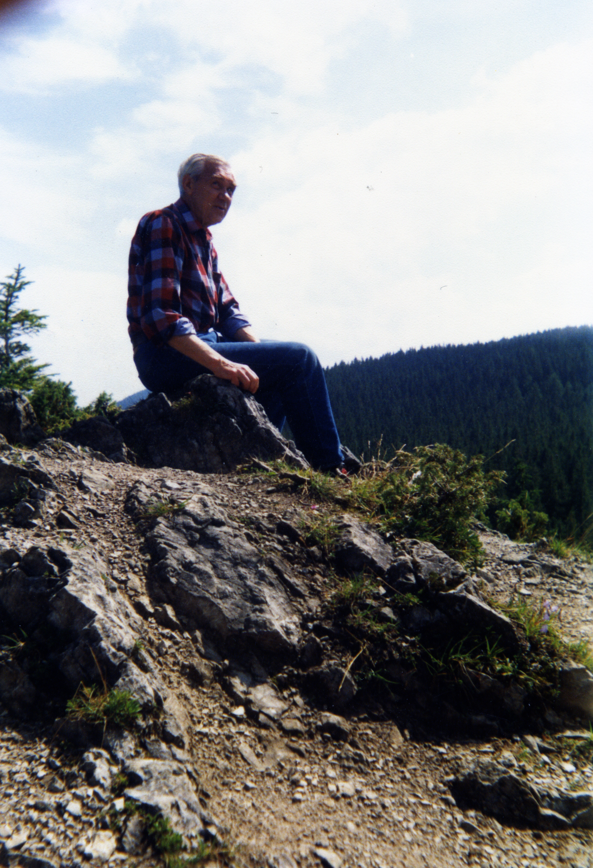 Tadeusz Szczerba 1923 - 2003